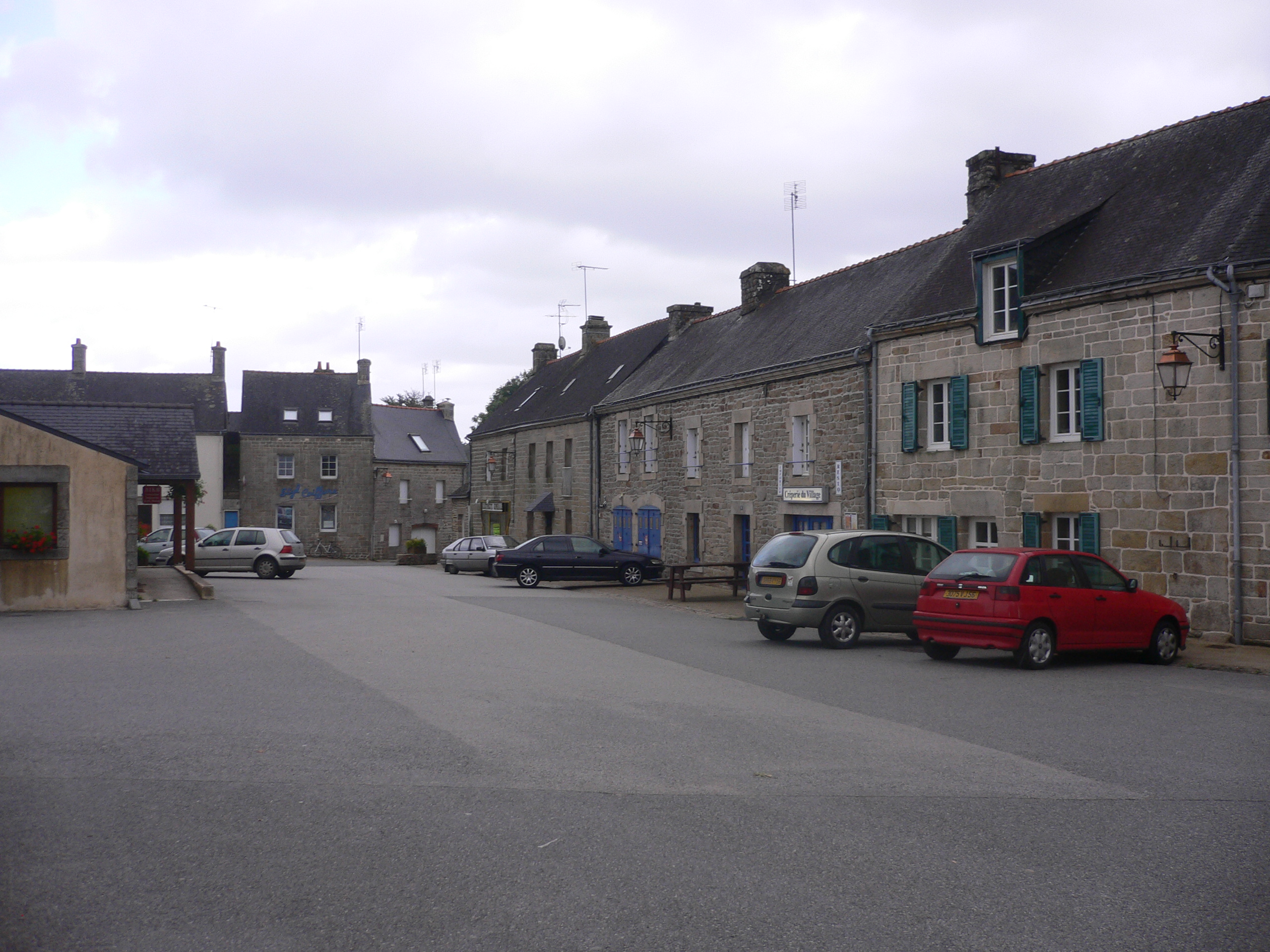 le centre bourg de Ploërdut, département du Morbihan, région Bretagne